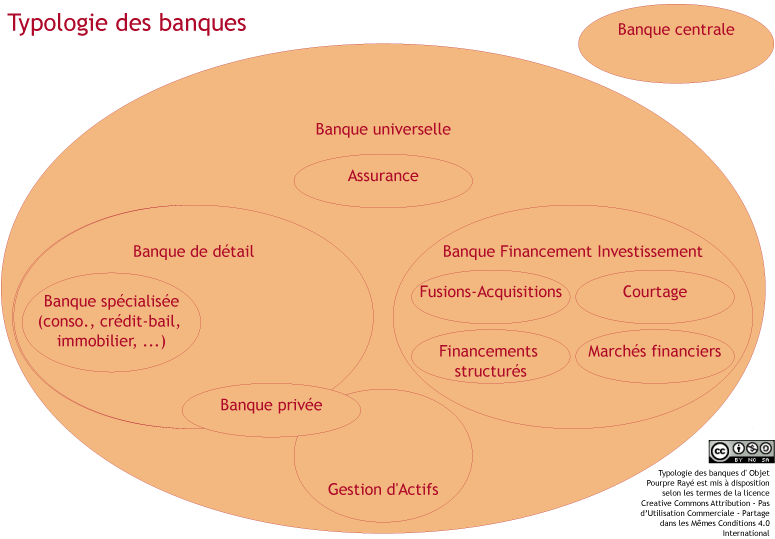 Ce schéma représente de façon synthétique la typologie des différents types de banques